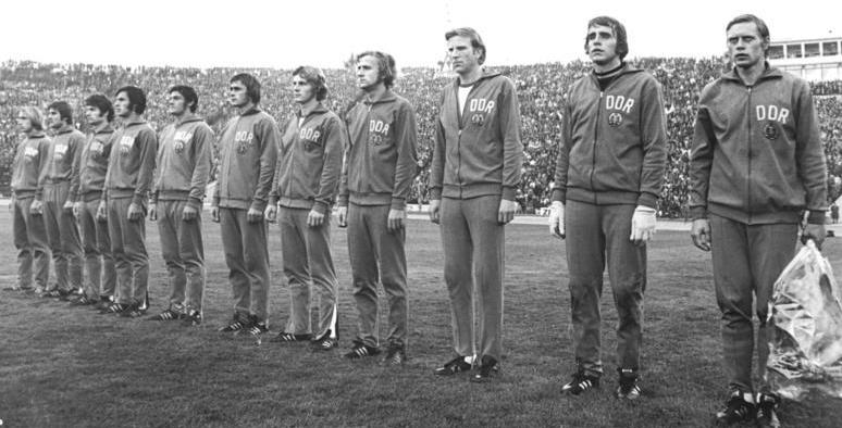 ADN-ZB Mittelstädt 28.9.73 Leipzig: Fußball-Weltmeisterschaftsqualifikationsspiel DDR - Rumänien 2:0 (am 26.9.73 im Leipziger Zentralstadion). Die DDR-Nationalmannschaft vor dem Spielbeginn. V.r.n.l.: Mannschaftskapitän Bernd Bransch, Torwart Jürgen Croy, Klaus Sammer, Hans-Jürgen Kreische, Joachim Fritsche, Lothar Kurbjuweit, Reinhard Lauck, Wolfgang Seguin, Wolfram Löwe, Peter Ducke und Joachim Streich.